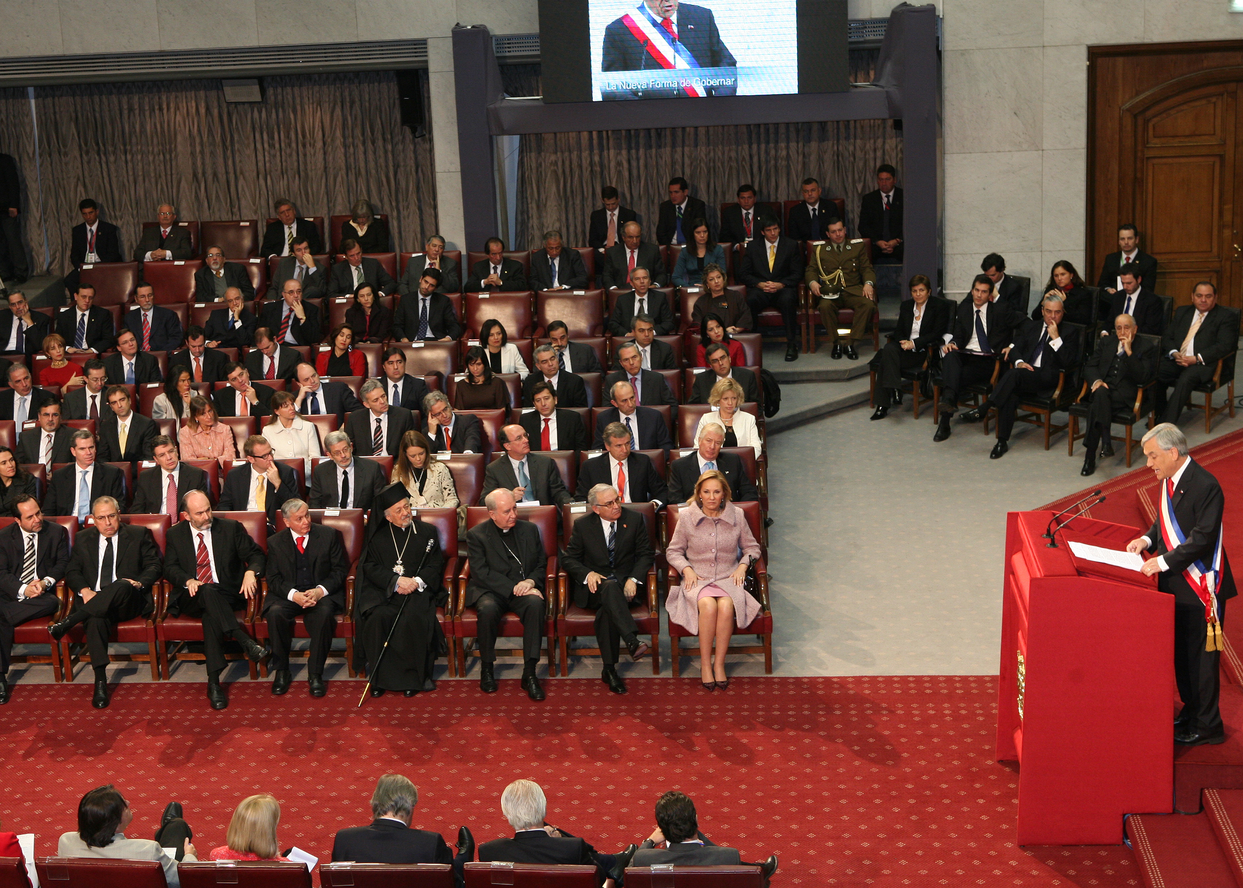 El Presidente de la República, Sebastián Piñera, entregó la primera Cuenta Pública a la Nación, con motivo de la inauguración del Período Ordinario de Sesiones del Congreso Nacional.